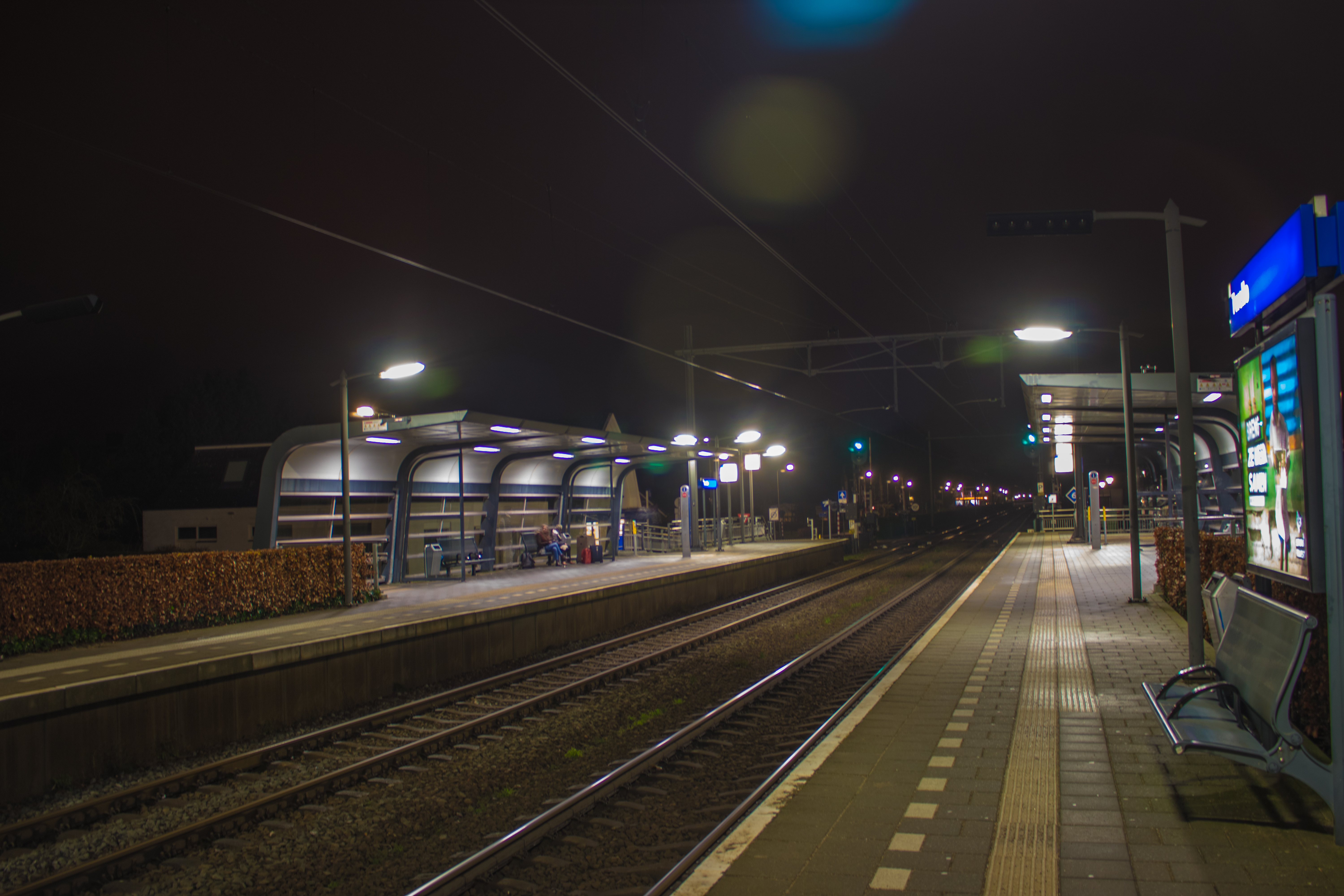 Station Twello door Thomasklaassen.nl